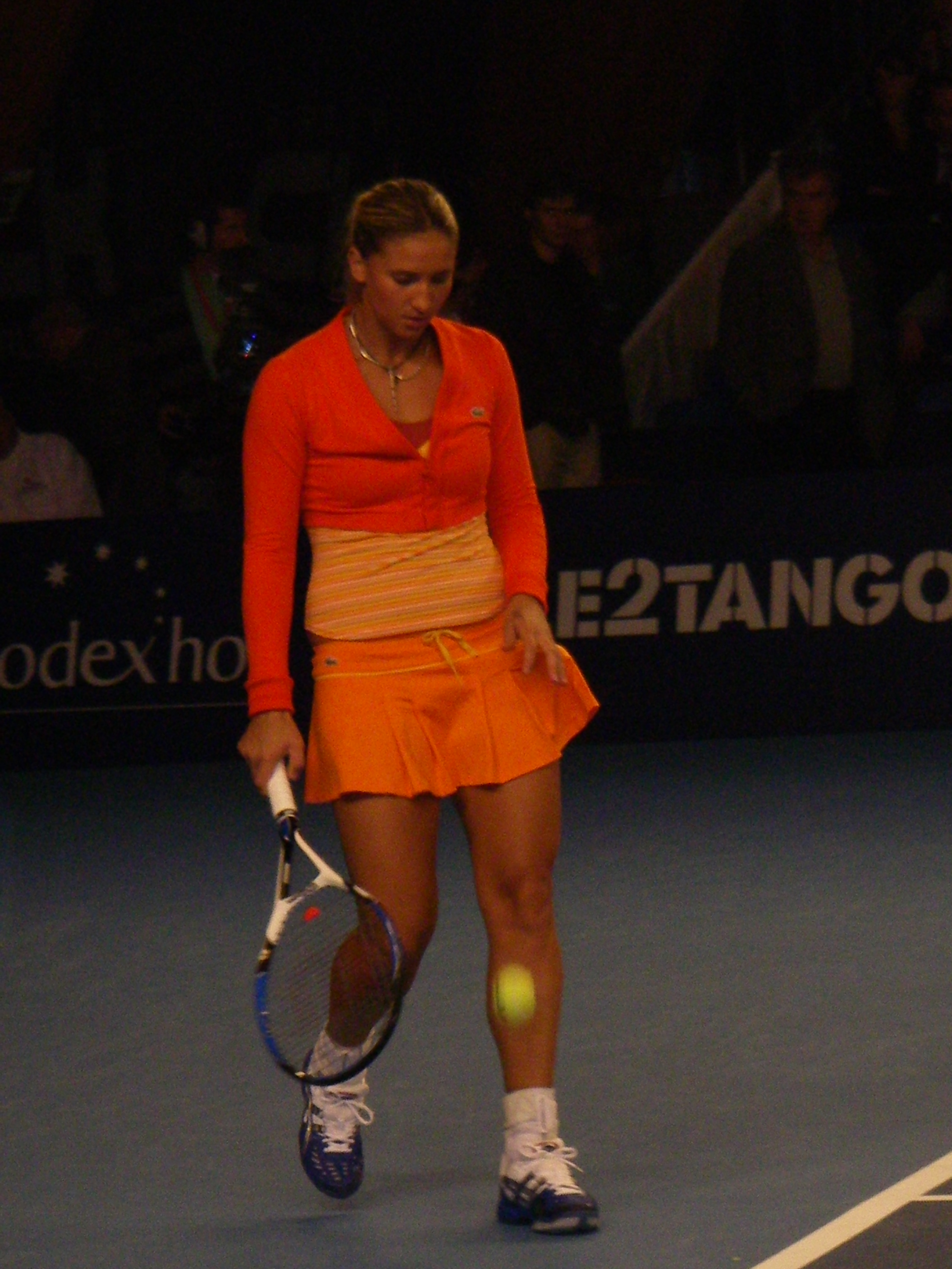 Tatiana Golovin